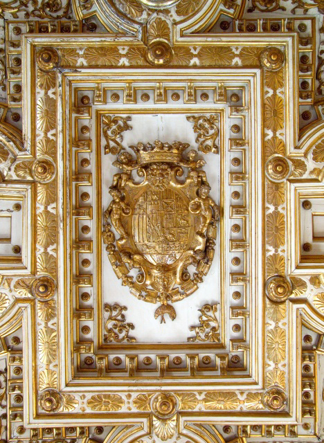 Wikipedia: Castel Capuano